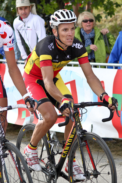 Etape 19 (L'Alpe d'Huez) du Tour de France 2011